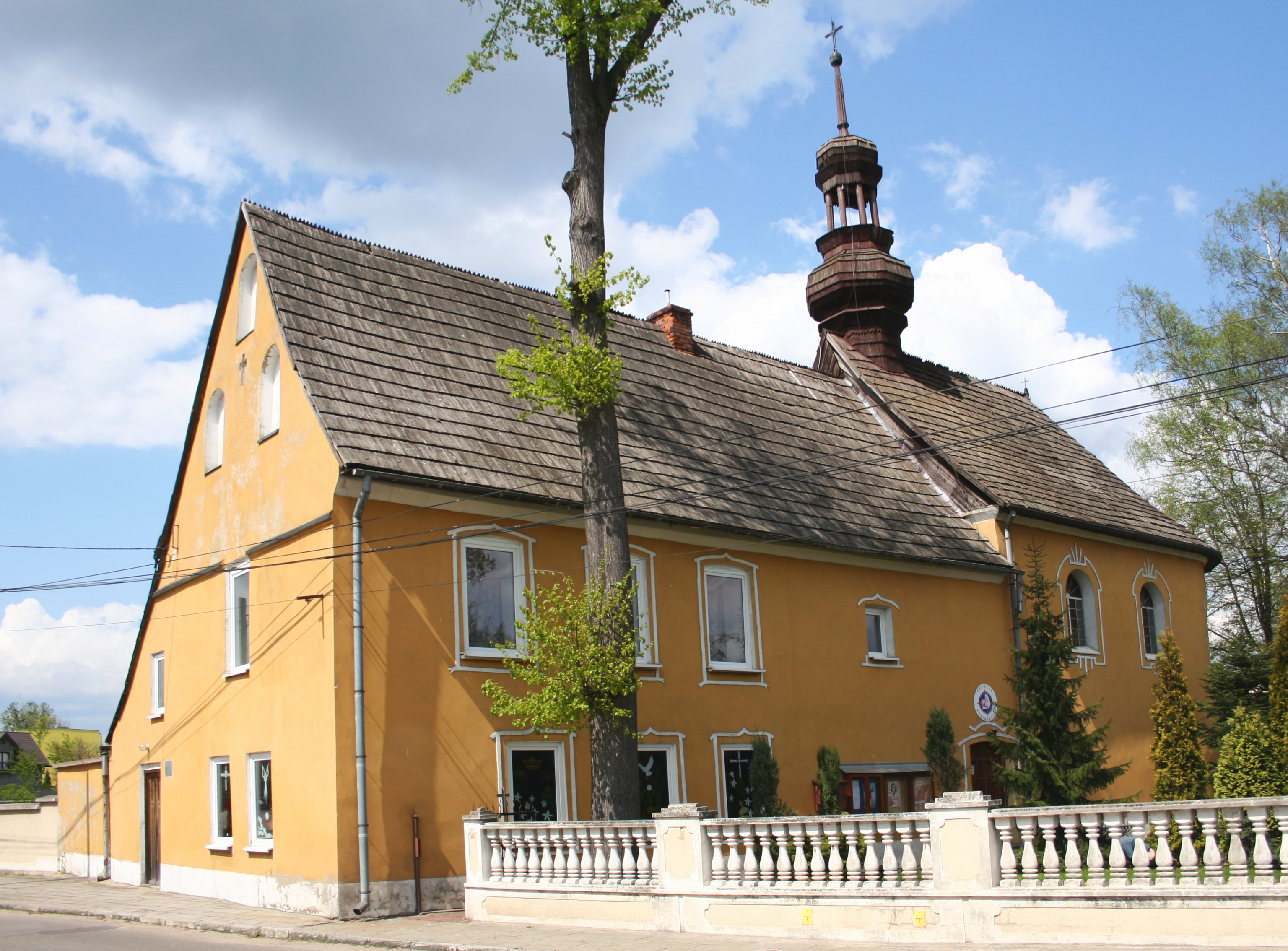 Kościół św. Barbary w Koziegłowach, Polska, województwo śląskie, powiat myszkowski